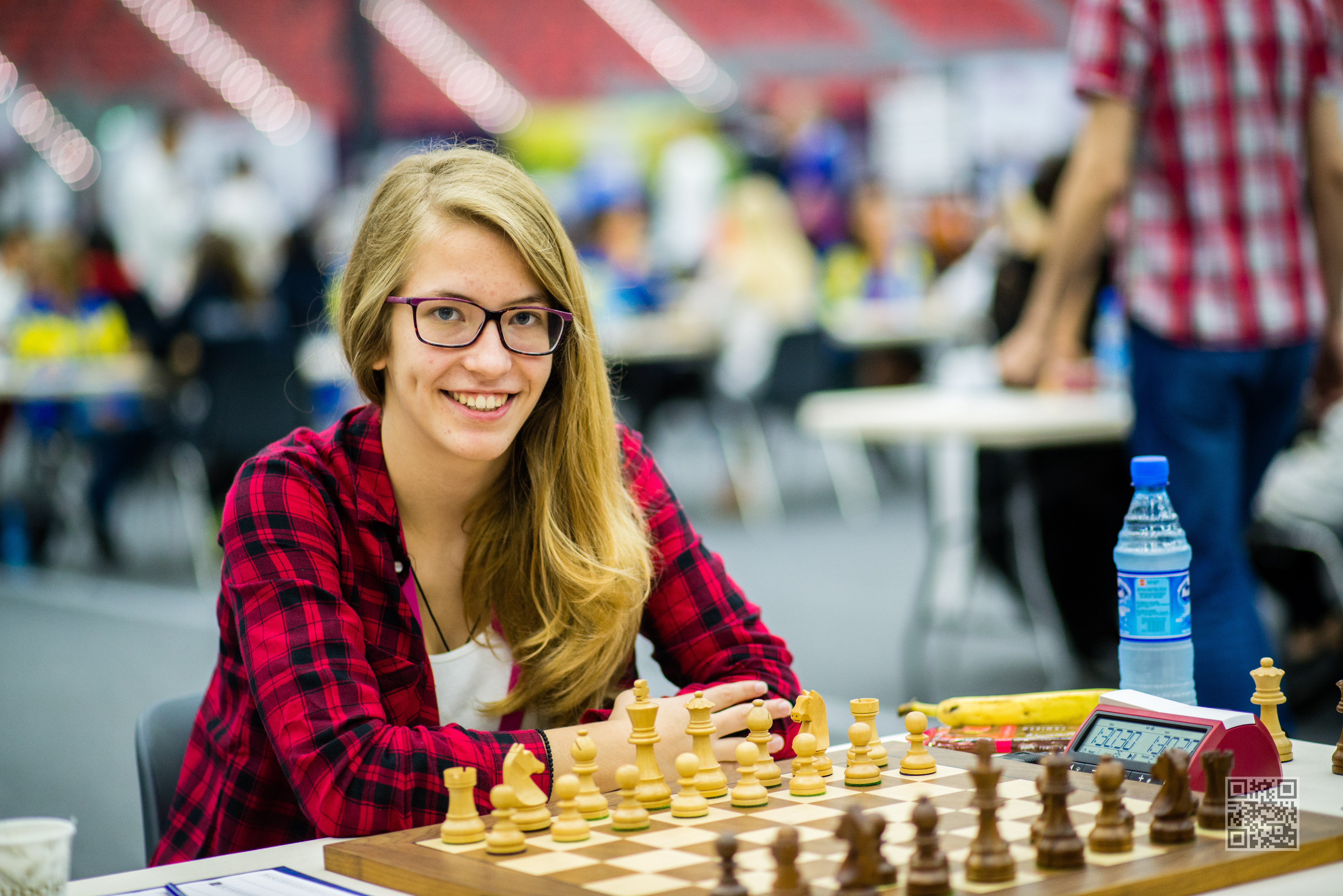 Tsolakidou Stavroula